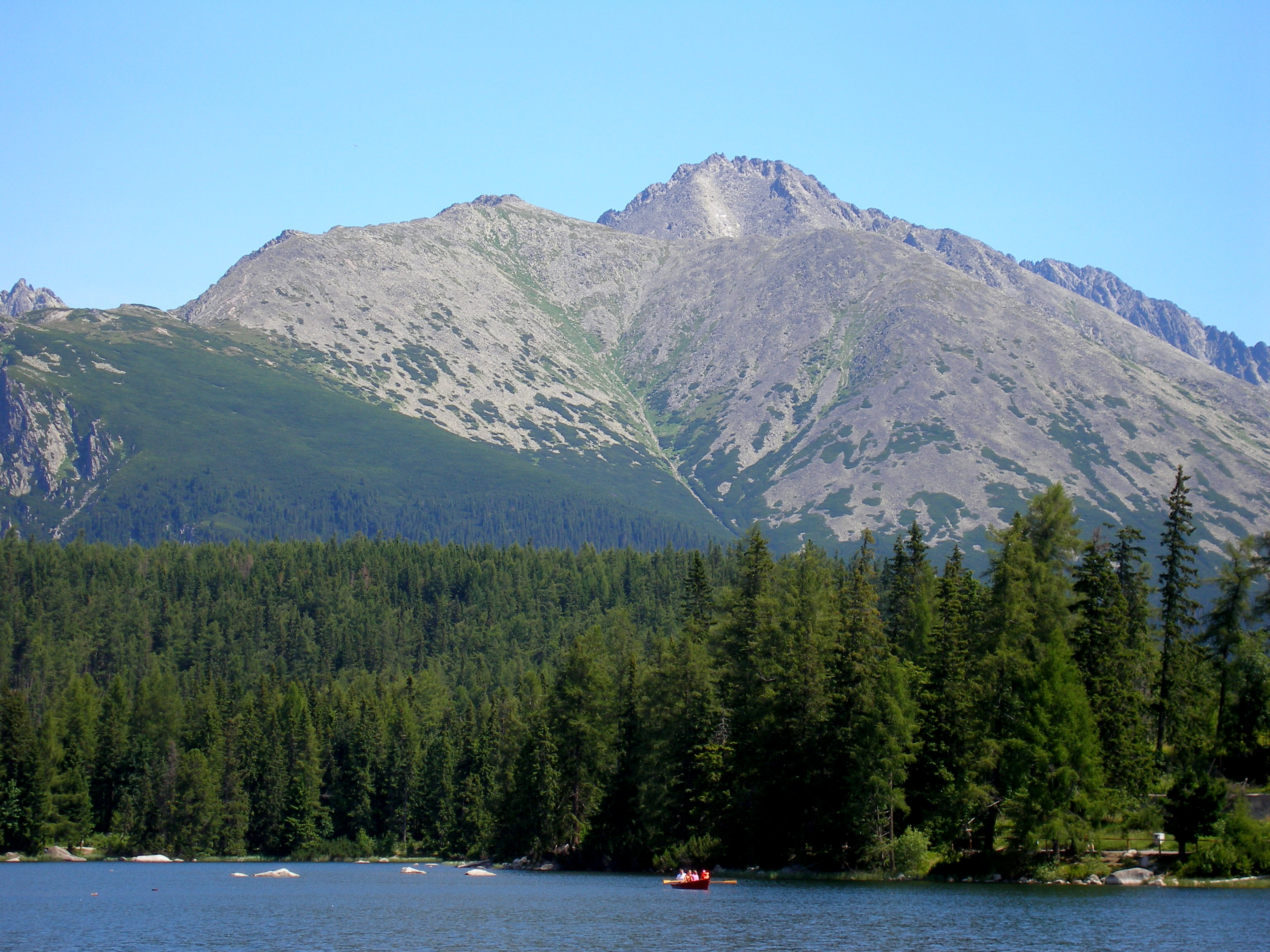 Horské pleso v tatranskej osade Štrbské Pleso. Okres Poprad.